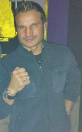 Javier Castillejo, Doble Campeón del Mundo